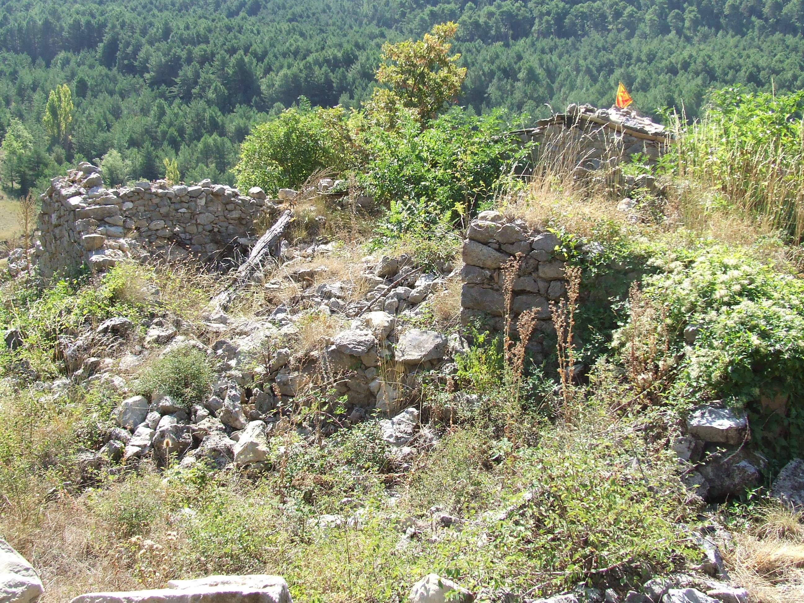 Cal Palou (la Torre d'Eroles, Abella de la Conca, Pallars Jussà)